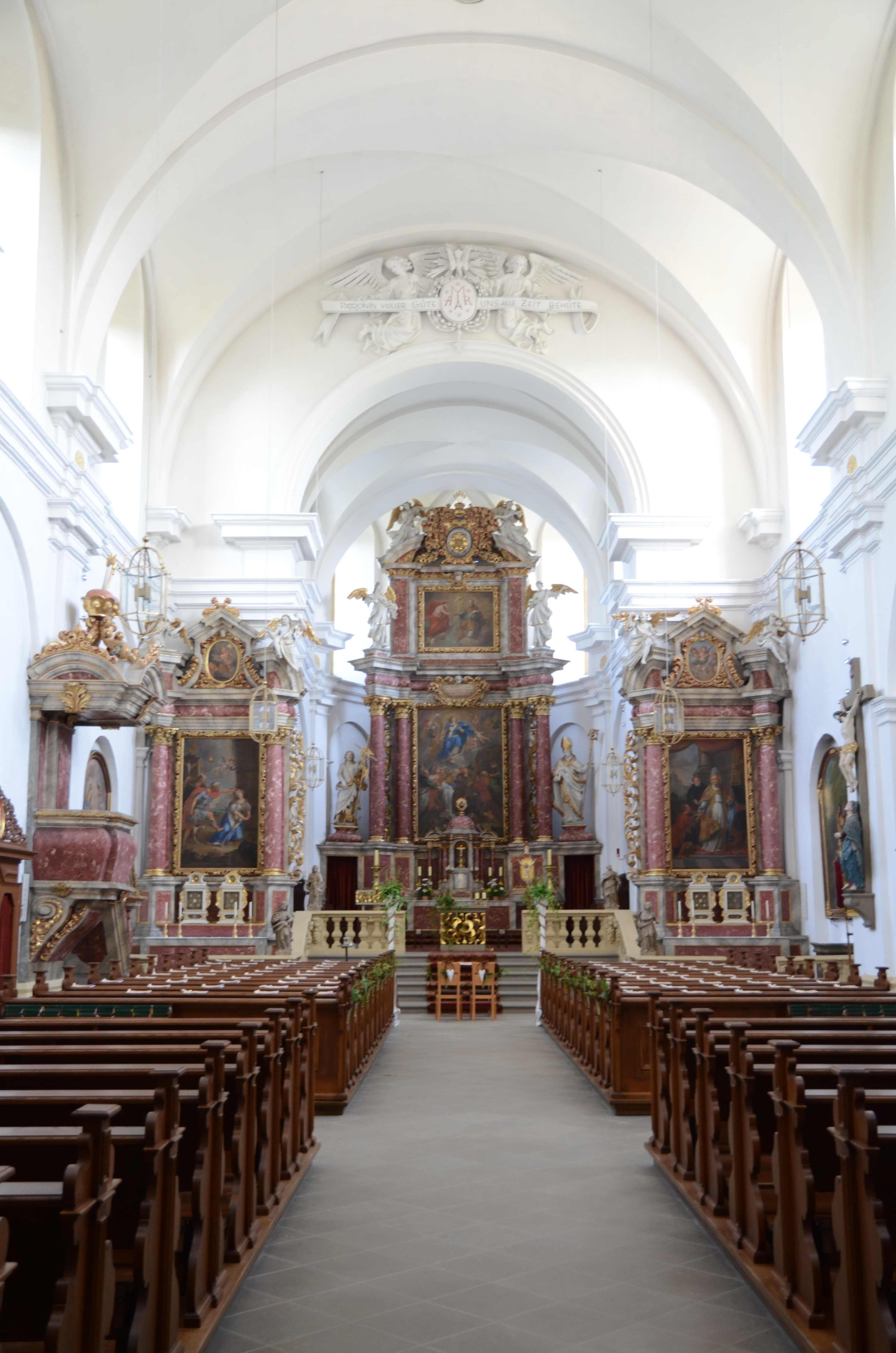 Fährbrück Wallfahrtskirche, Innenraum